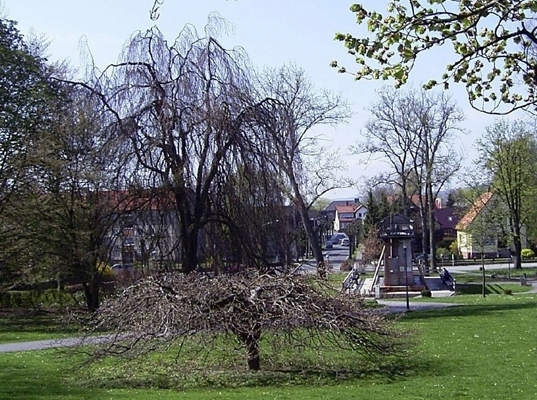 Große Hängebuche und junge Süntelbuche in Bad Münder am Deister, Deutschland